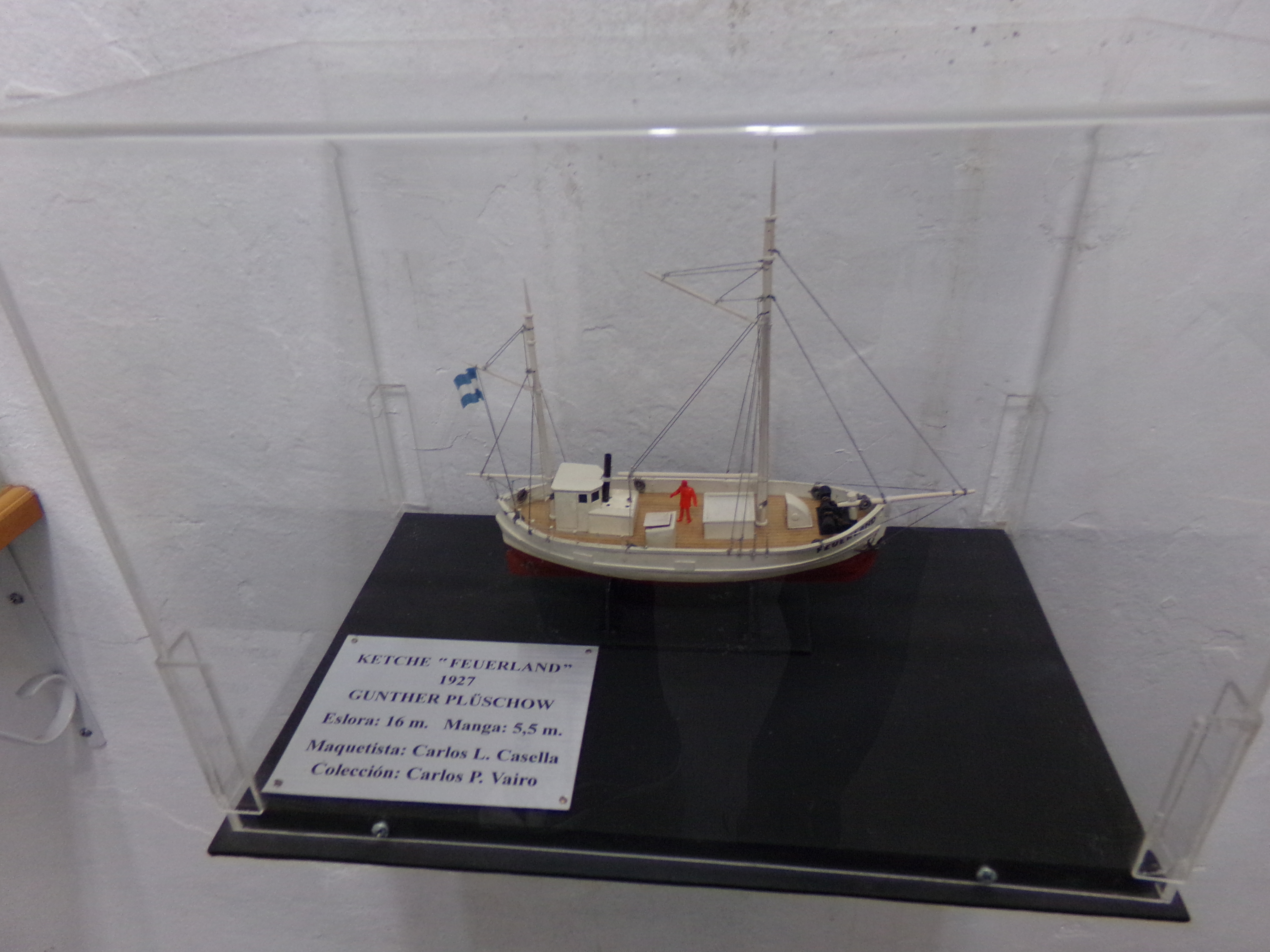 Museo Maritimo y Ex Presidio de Ushuaia, TDF, Arg